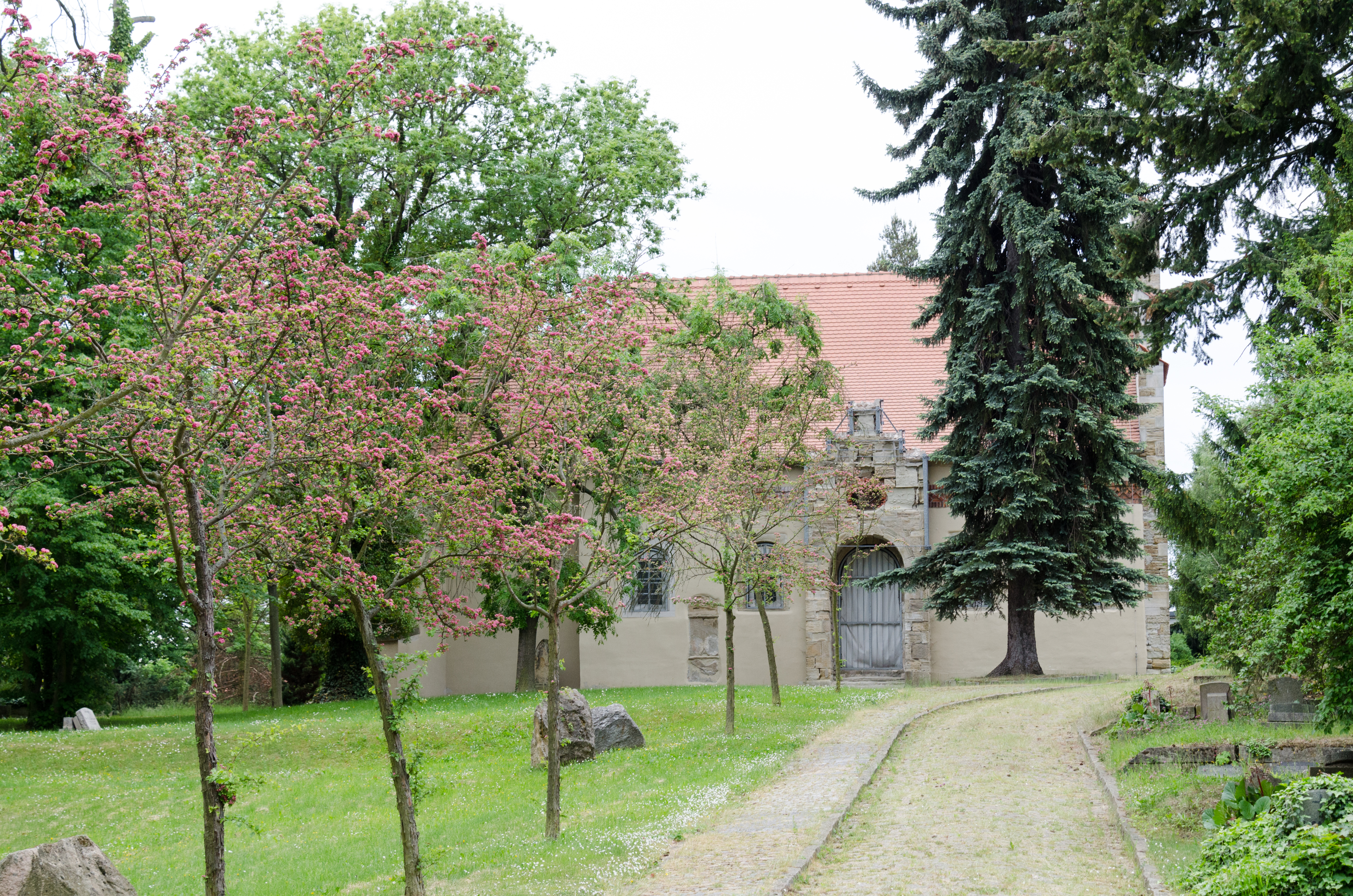 Zeitz, Stephanstraße, Unterer Johannisfriedhof